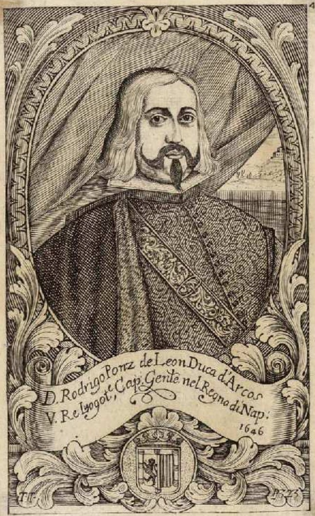 Retrato de Rodrigo Ponce de León, IV duque de Arcos y virrey de Nápoles, recogido en el libro Teatro eroico, e politico de governi di Vicere del Regno di Napoli Dal tempo del Re Ferdinando il Cattolico Fino al presente, de Domenico Antonio Parrino (1694)